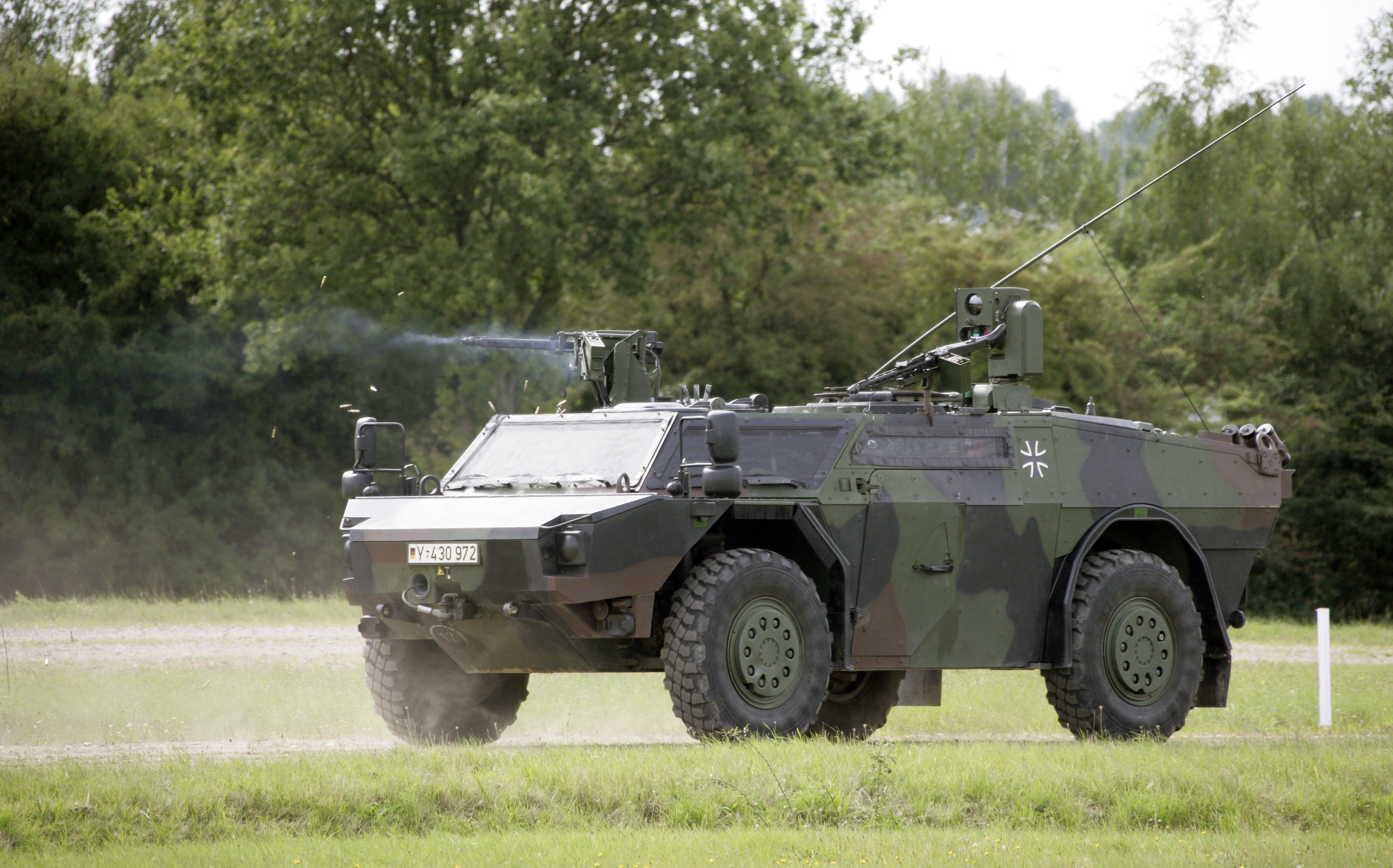 Der Bundesminister der Verteidigung Karl-Theodor zu Guttenberg besucht im Rahmen seiner Sommerreise das Aufklärungsbataillon 6 "Holstein" in Eutin. Dabei werden ihm die Fähigkeiten des leicht gepanzerten Spähwagen "Fennek" mit Beaobachtungs- und Aufklärungsausstattung bei einer dynamischen Vorführung ausserhalb der Kaserne demonstriert. ©Bundeswehr/Bienert